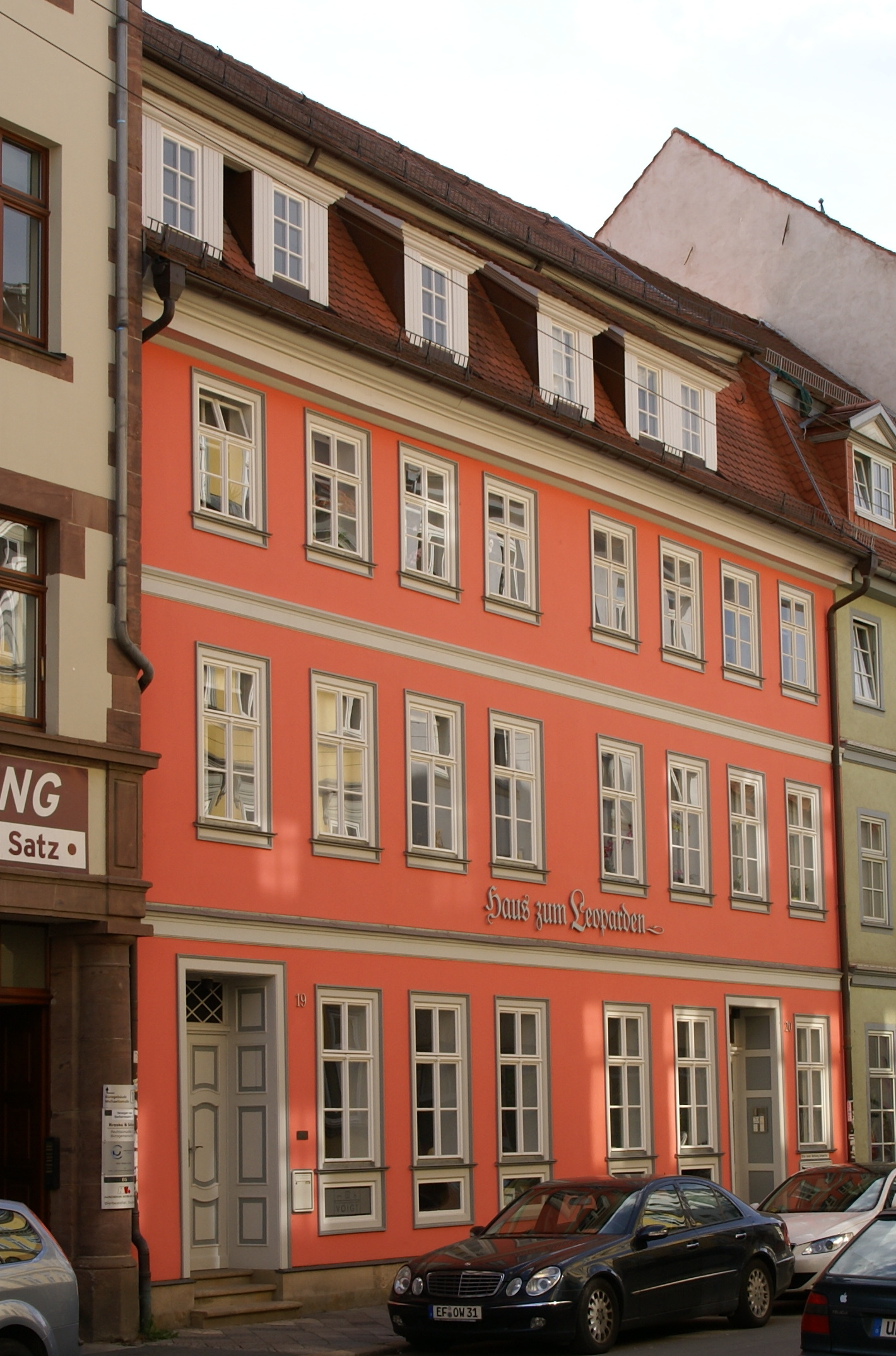 Haus zum Leoparden in der Michaelisstraße (Das Aufnahmedatum ist wahrscheinlich falsch. Die Fassade erscheint makellos und wurde erst im Frühjahr 2015 saniert)